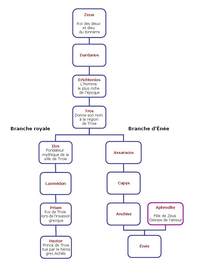 Représentation visuelle de l'ascendance du héros troyen d’Énée